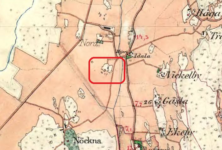 Del av Fållnäs J112-67-13, Häradsekonomiska kartan, visande platsen för Nora kvarn (i röd ram)